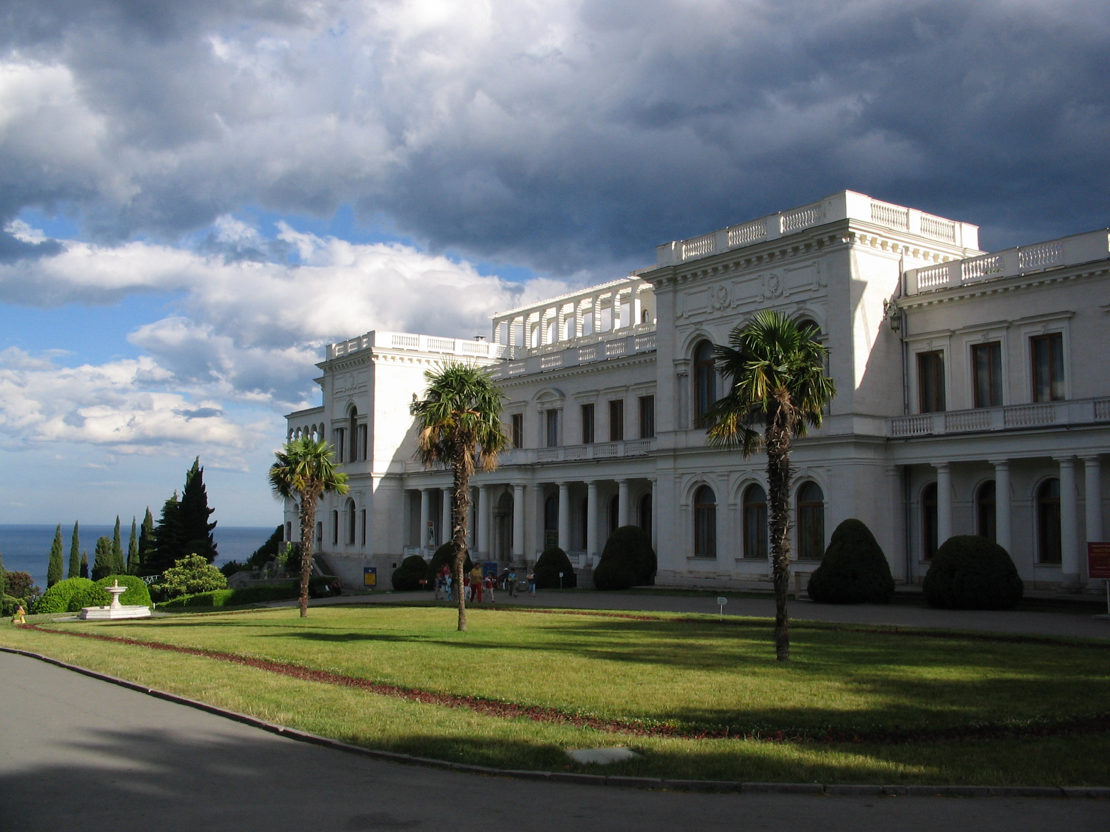 Ливадийский дворец